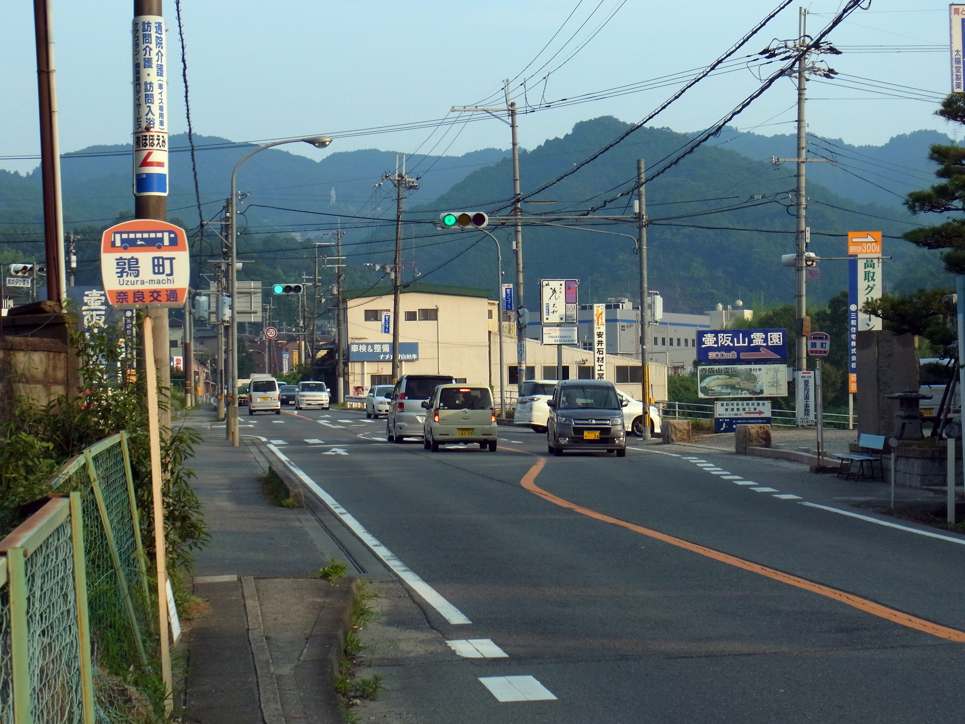 国道169号 鶉町バス停付近 Uzura-machi 2012.8.13